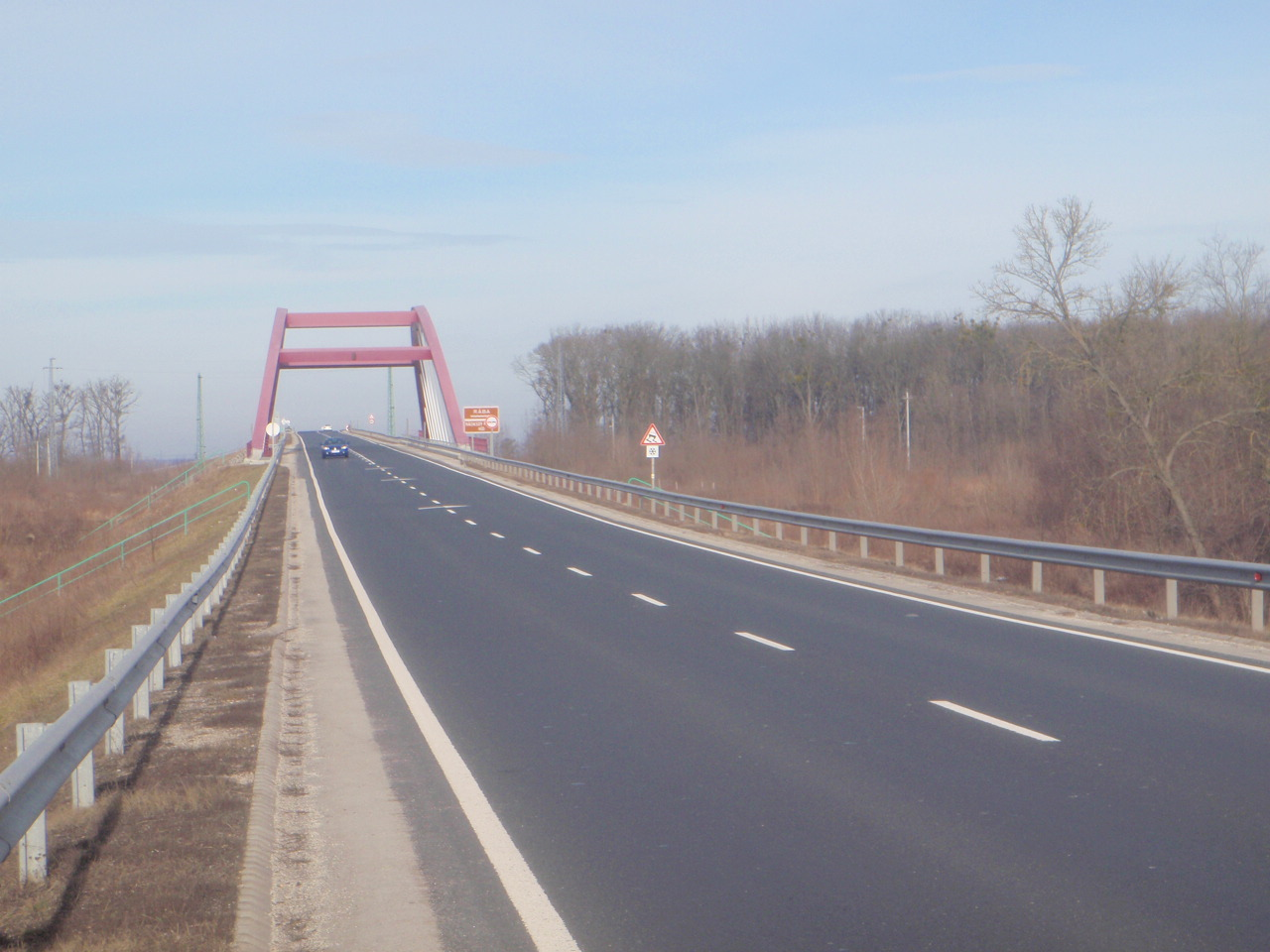 B84 Hauptstrasse bei Sárvár mit Raab Brücke